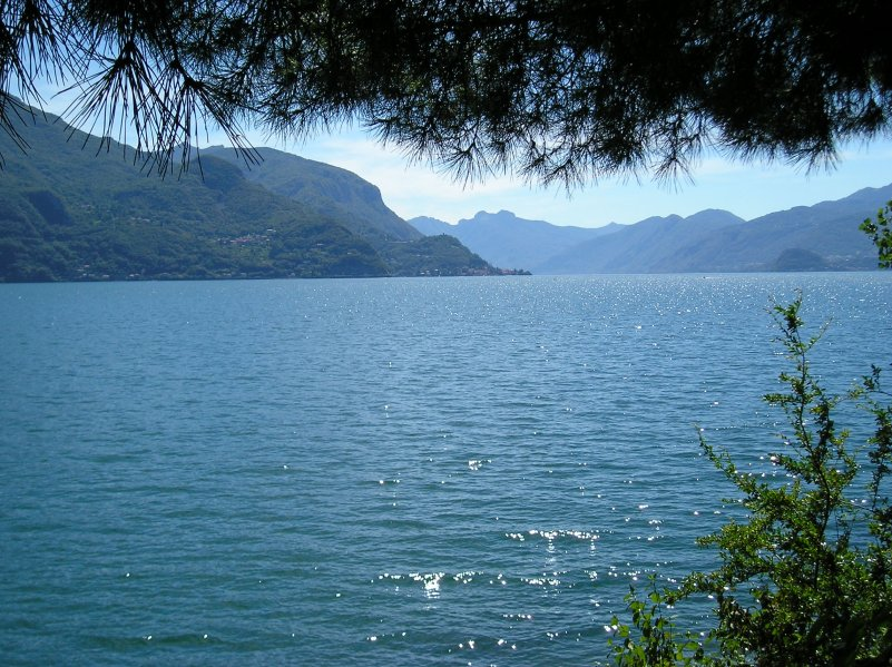 Lac de cômePhoto prise par François Trazzi